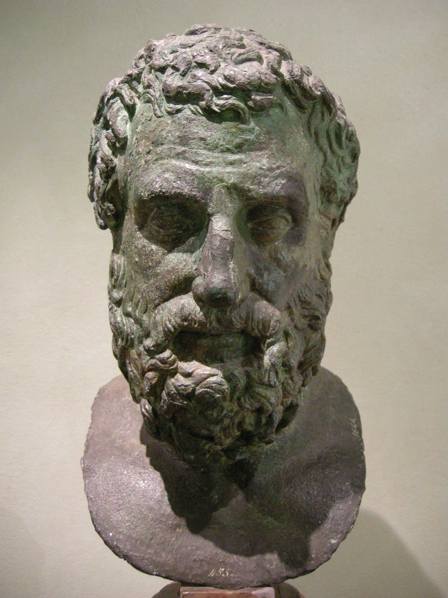 Archeologico firenze, bronzi della Meloria, eschilo